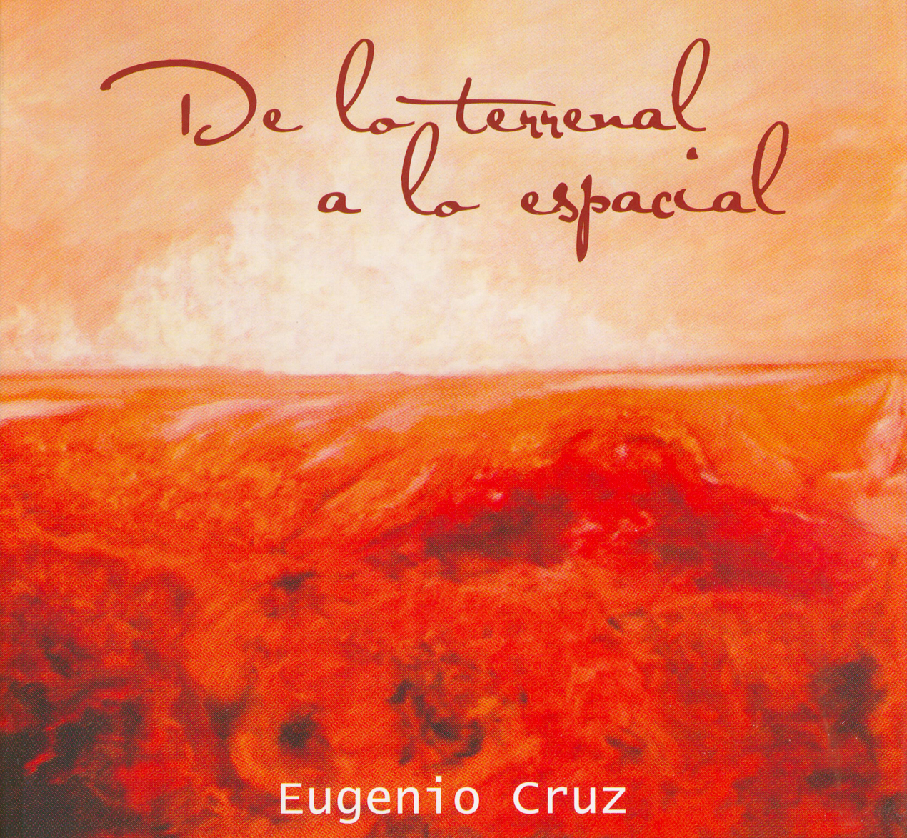 Portada del tercer y último libro del pintor y poeta Eugenio Cruz Vargas (1923 – 2014). Fue publicado en 2011 bajo el sello Estrella Verde Ediciones, en Santiago, Chile (21,5 x 21, cm., edición rústica). Las 252 páginas reúnen 32 poemas con un apéndice de pensamientos. Se expresa una clara tendencia al surrealismo poético coincidente con su desarrollo pictórico hacia la abstracción. Autora de la fotografía y/o escaneo de la portada de este libro: Liliana Fuentes, quien por el consentimiento del propietario titular de los derechos de autor de la obra del pintor Eugenio Cruz Vargas, publica esta fotografía en internet bajo la Licencia de Uso Creative Commons, Atribución-Compartigual 3.0 Unported (CC BY-SA 3.0).